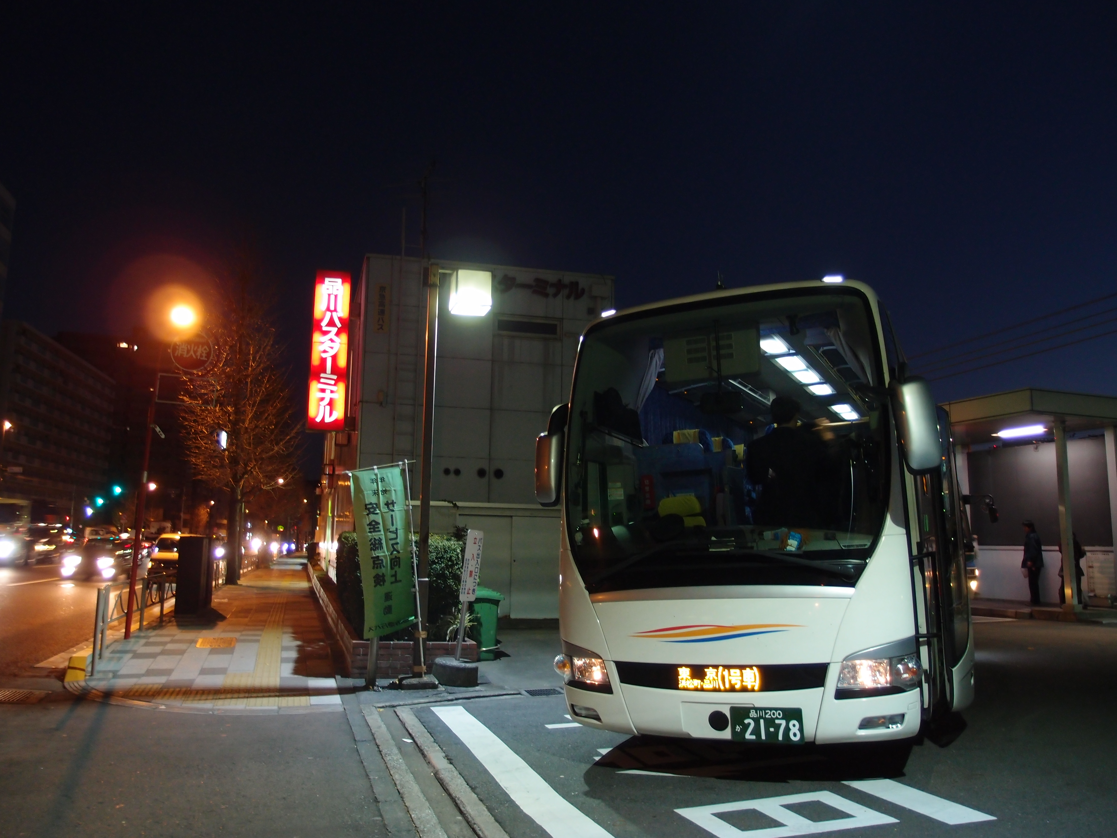 京急品川バスターミナルに到着した京浜急行バス運行のパイレーツ号（今治国際ホテル→品川BT）